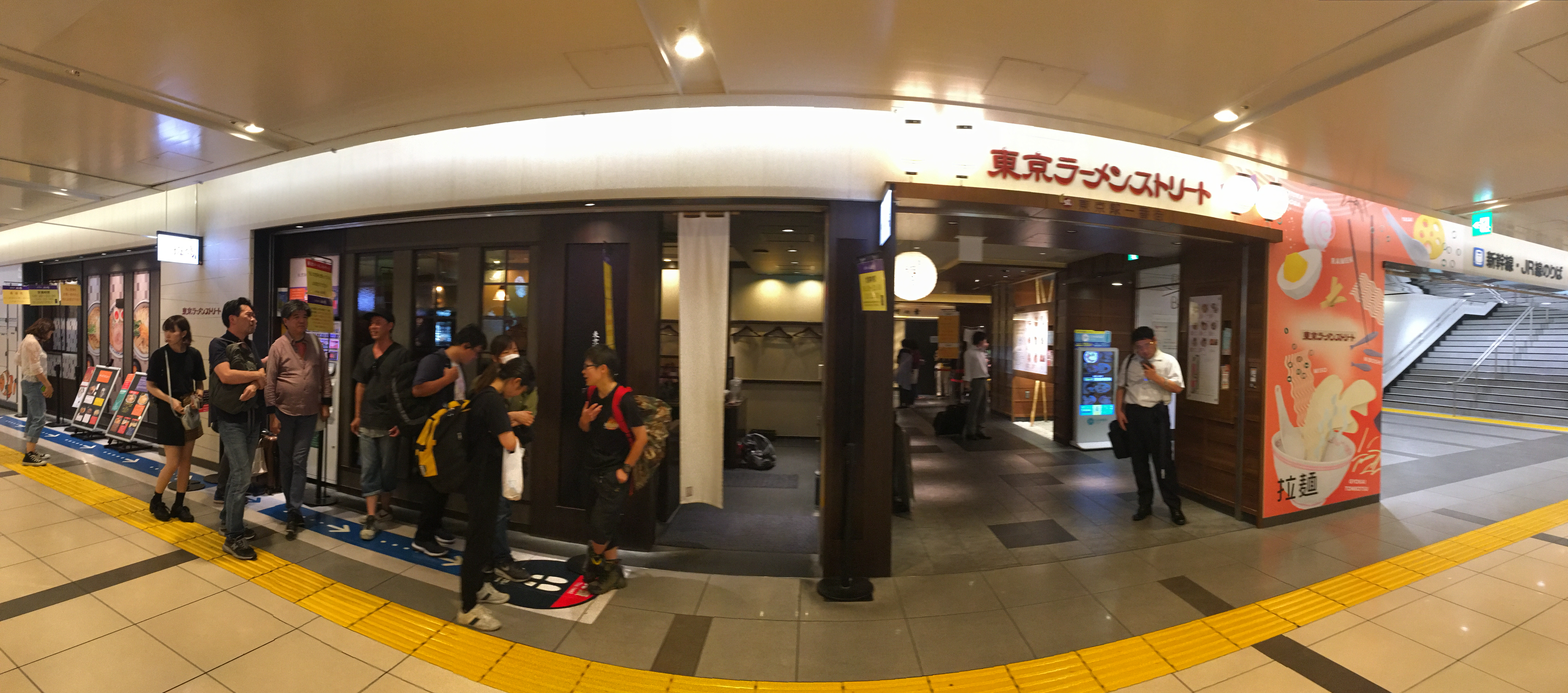 東京ラーメンストリート (Tokyo ramen street)